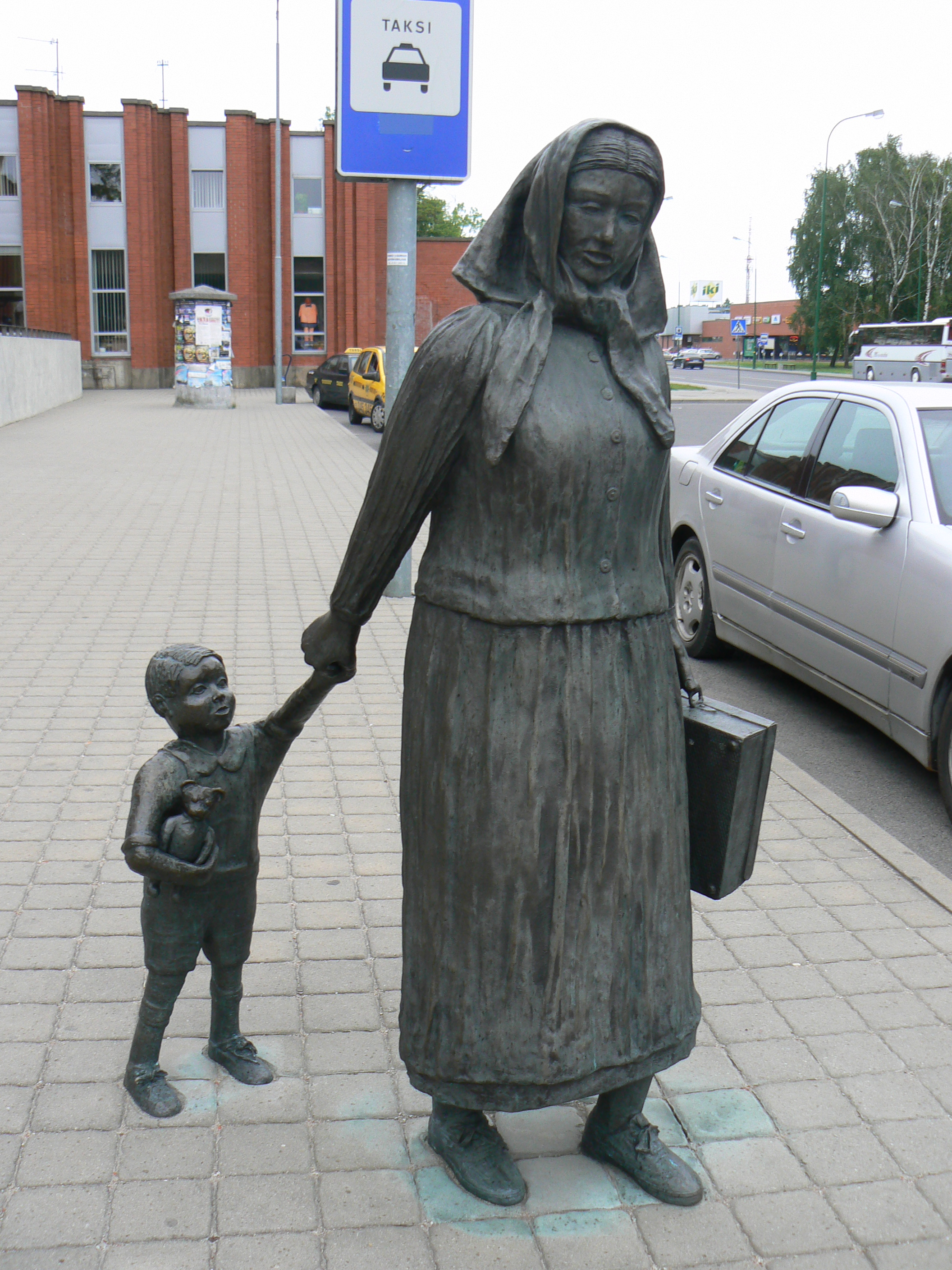 Socha Žemaitė s chlapcem před vlakovým nádražím v Klaipėdě